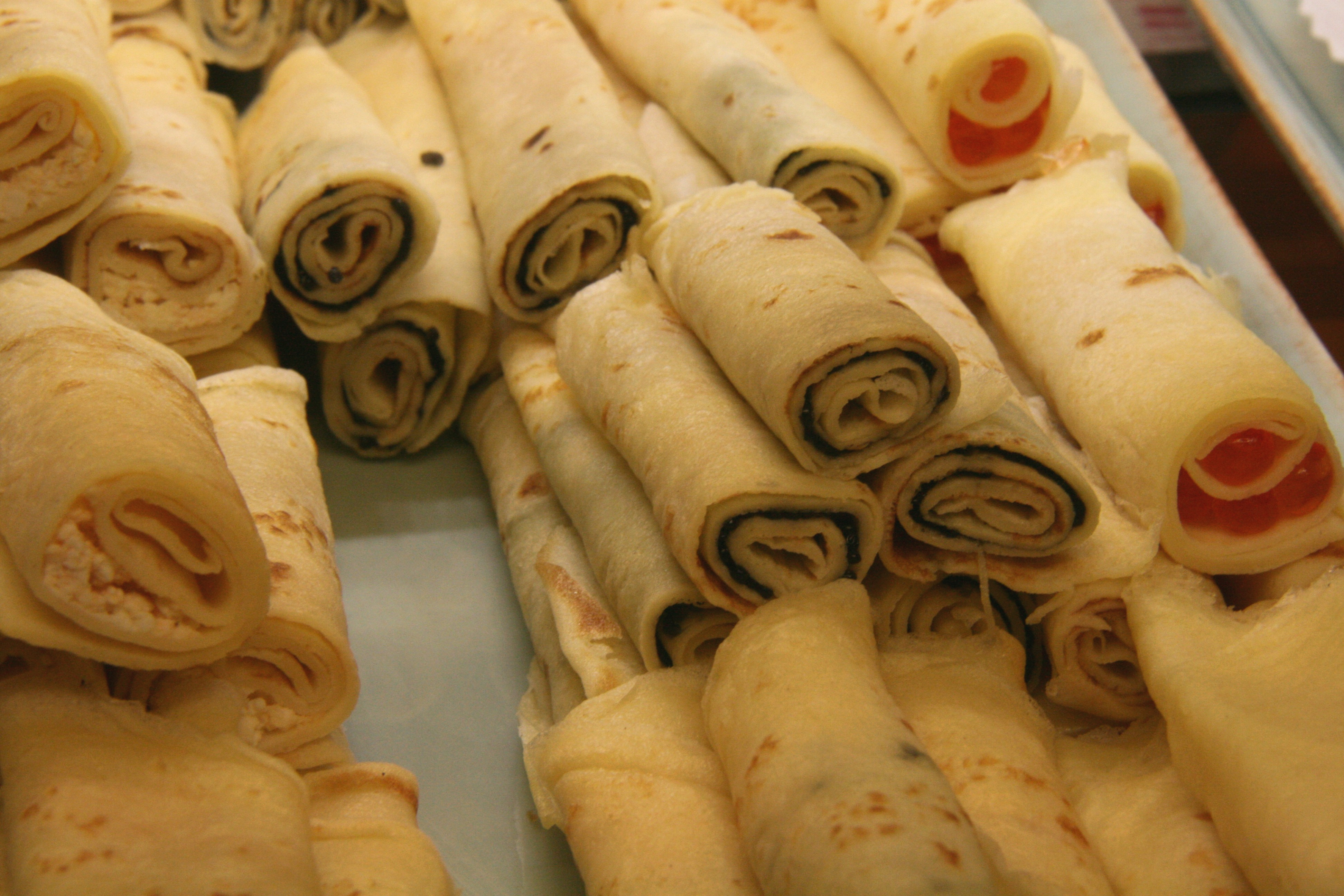 Blinis enrrollados (Diversos sabores)